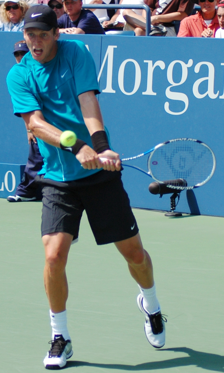 Tomas Berdych US Open 2009